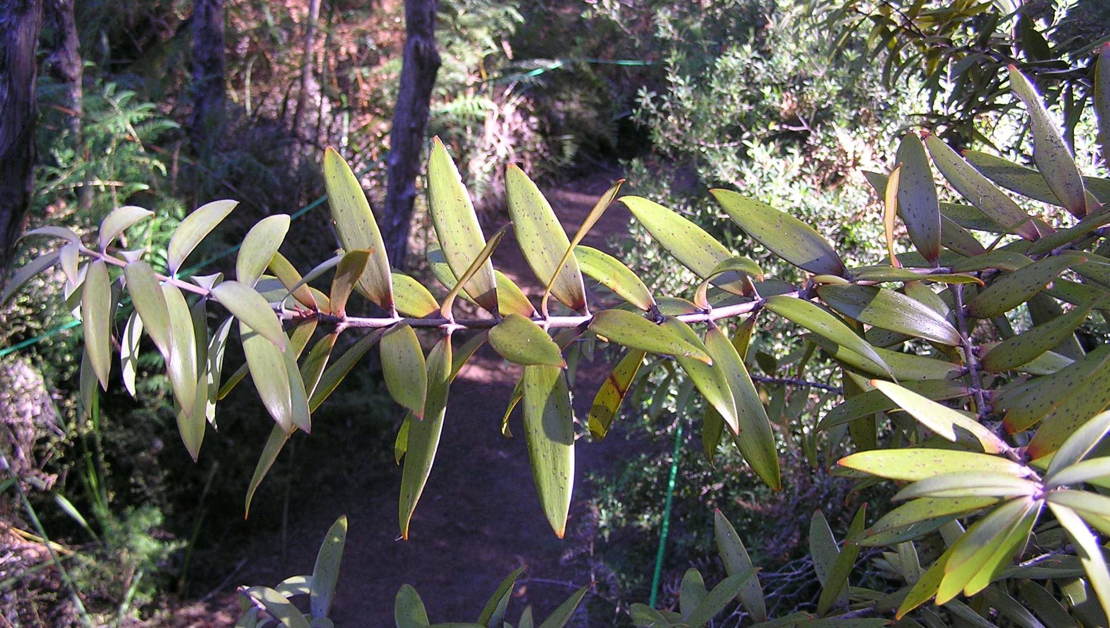 Hojas de kauri joven (Gumdiggers Park en Waiharara, Northland, Nueva Zelanda) Young kauri leaves (from a young kauri tree at Gumdiggers Park, Waiharara, New Zealand). Agathis australis Author: Mr. Tickle Date: March 29th, 2005